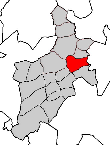 Situación da parroquia de Abegondo no concello de Abegondo